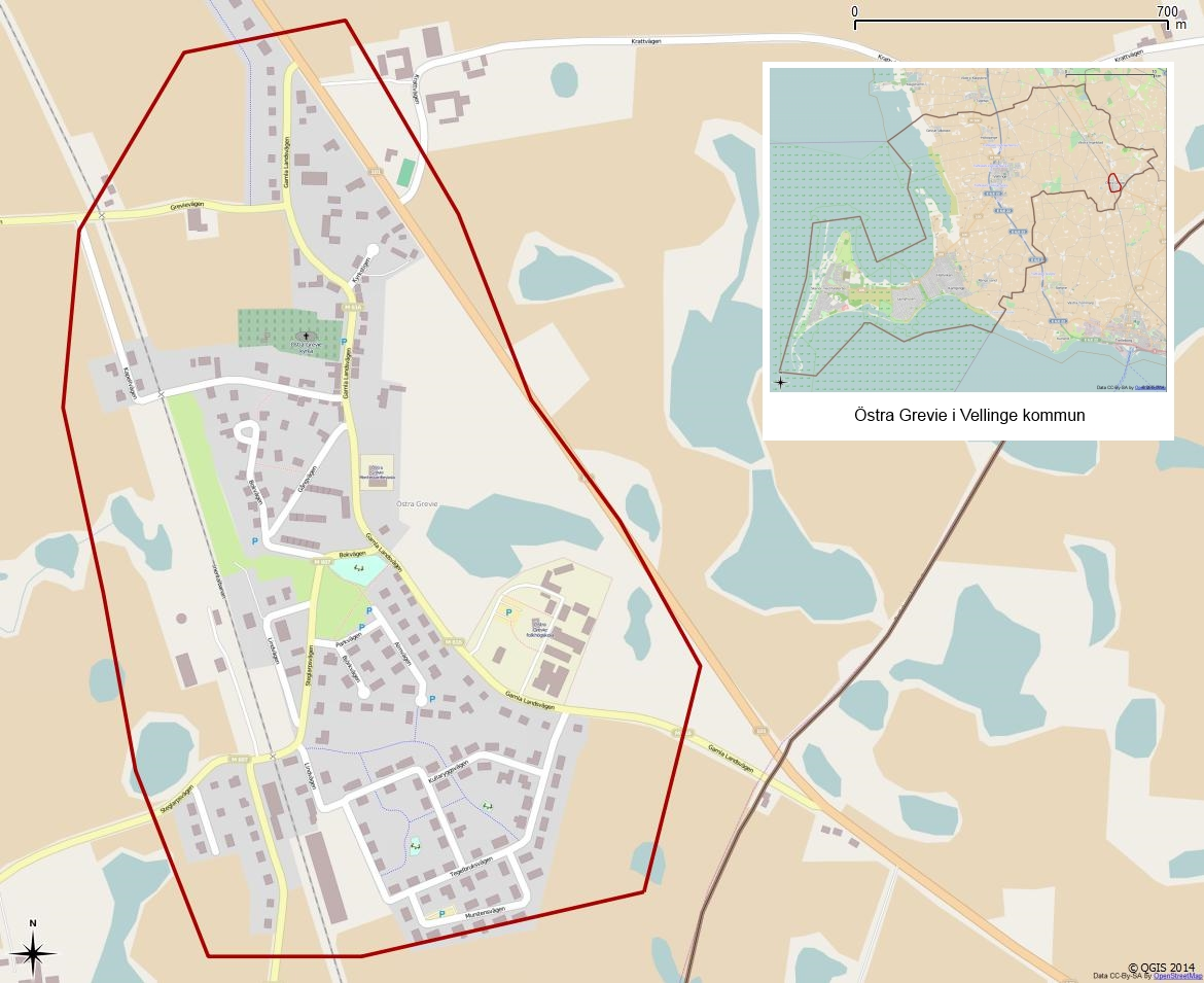 Tätorten Östra Grevies gränser 1990 enligt Atlas över rikets indelningar 1992.